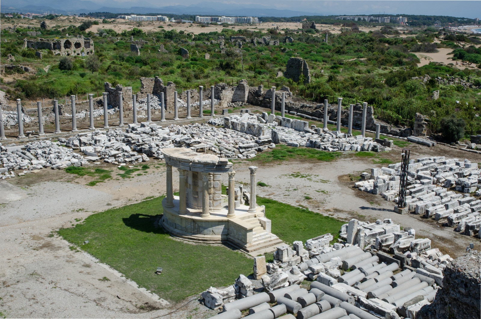 Side: Blick vom Theater auf die Handelagora in östliche Richtung. Unter grünem Bewuchs die byzantinischen Ruinen. Links das "Krankenhaus", rechts hinten vor der Dünenzone ein Turm der Stadtmauer.